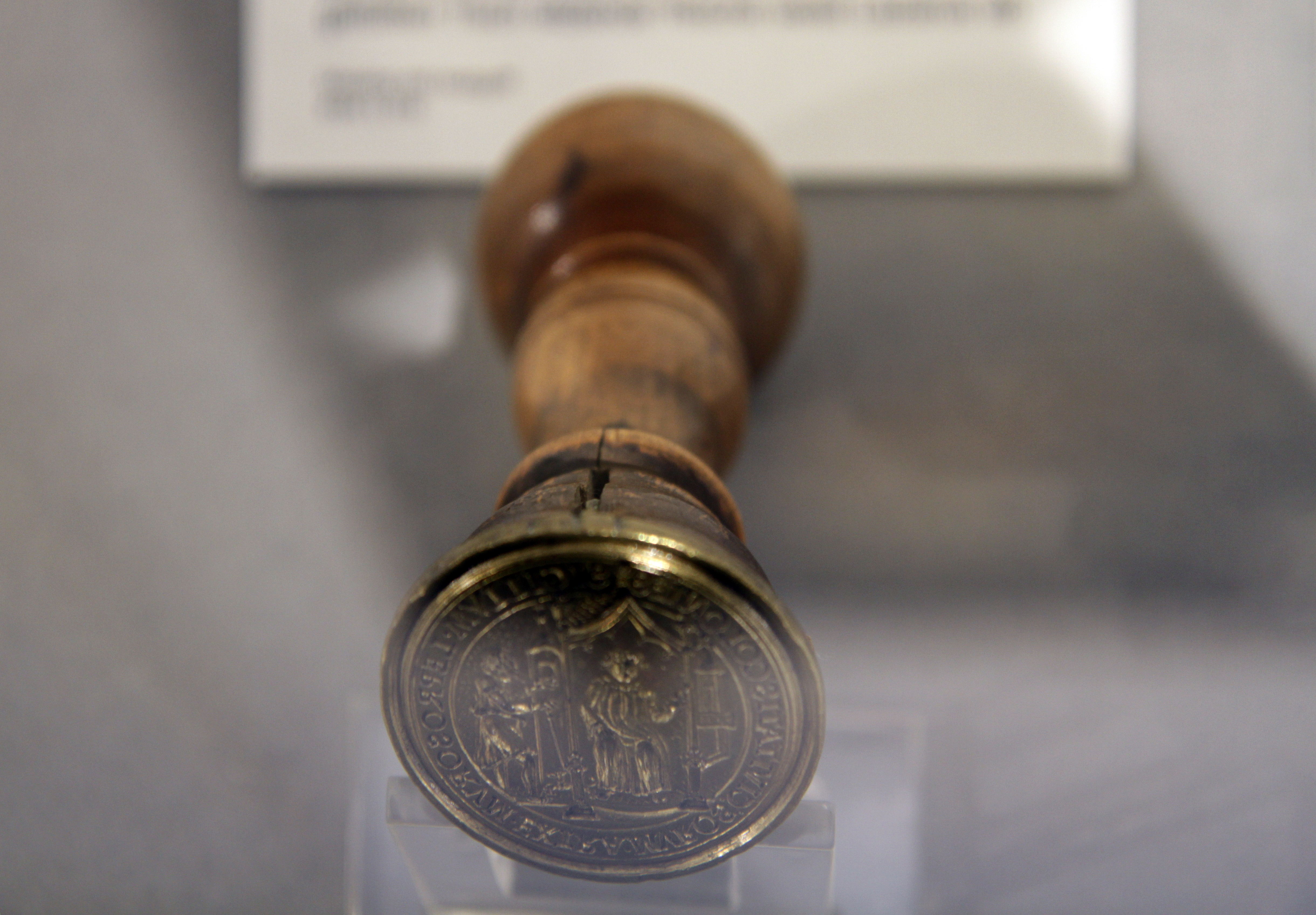 Köln-Melaten, Typar des Leprosenhauses aus der 2. Hälfte des 16-Jahrhunderts